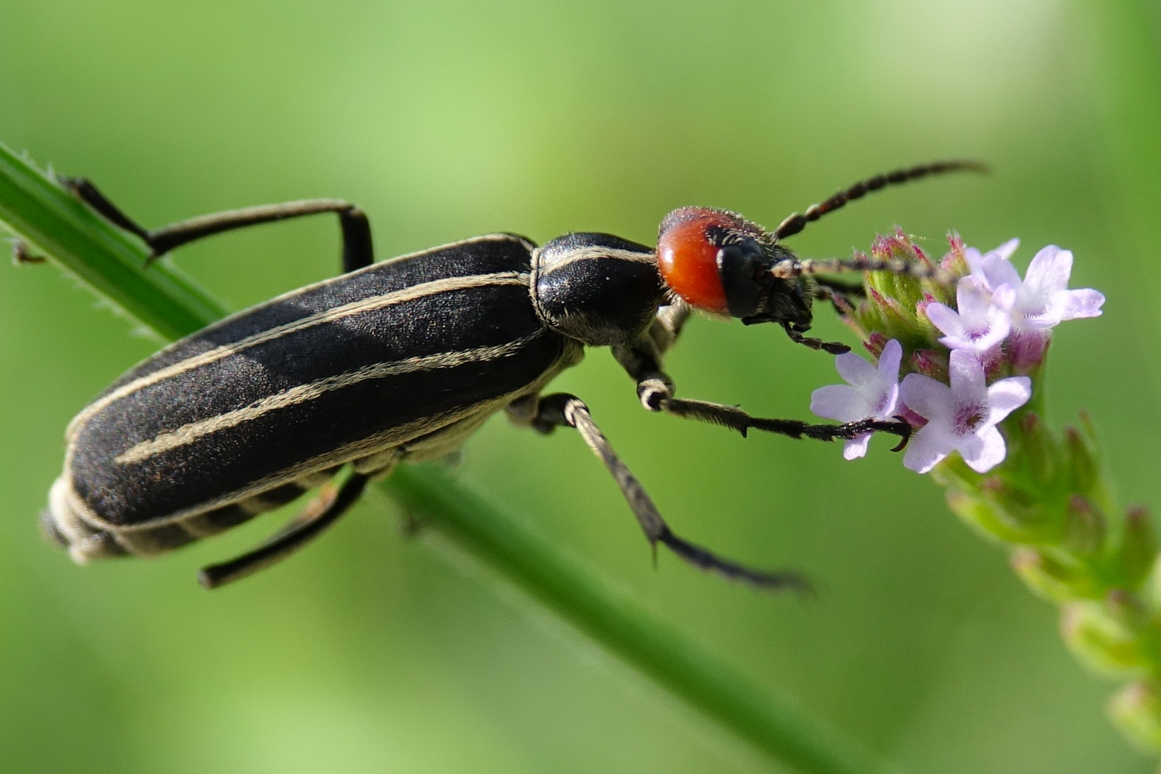 マメハンミョウ 日本、東海地方